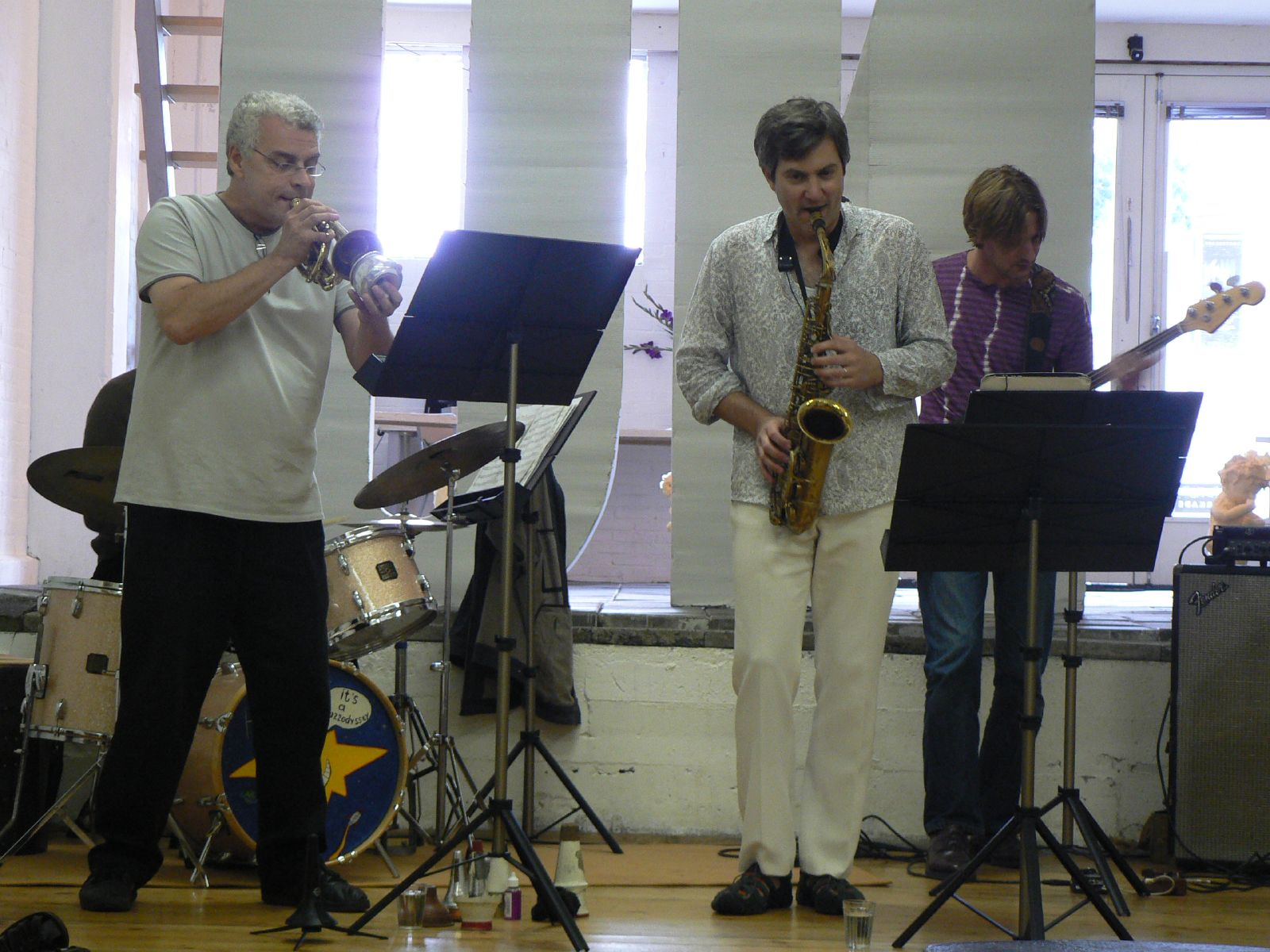 Herb Robertson (left)